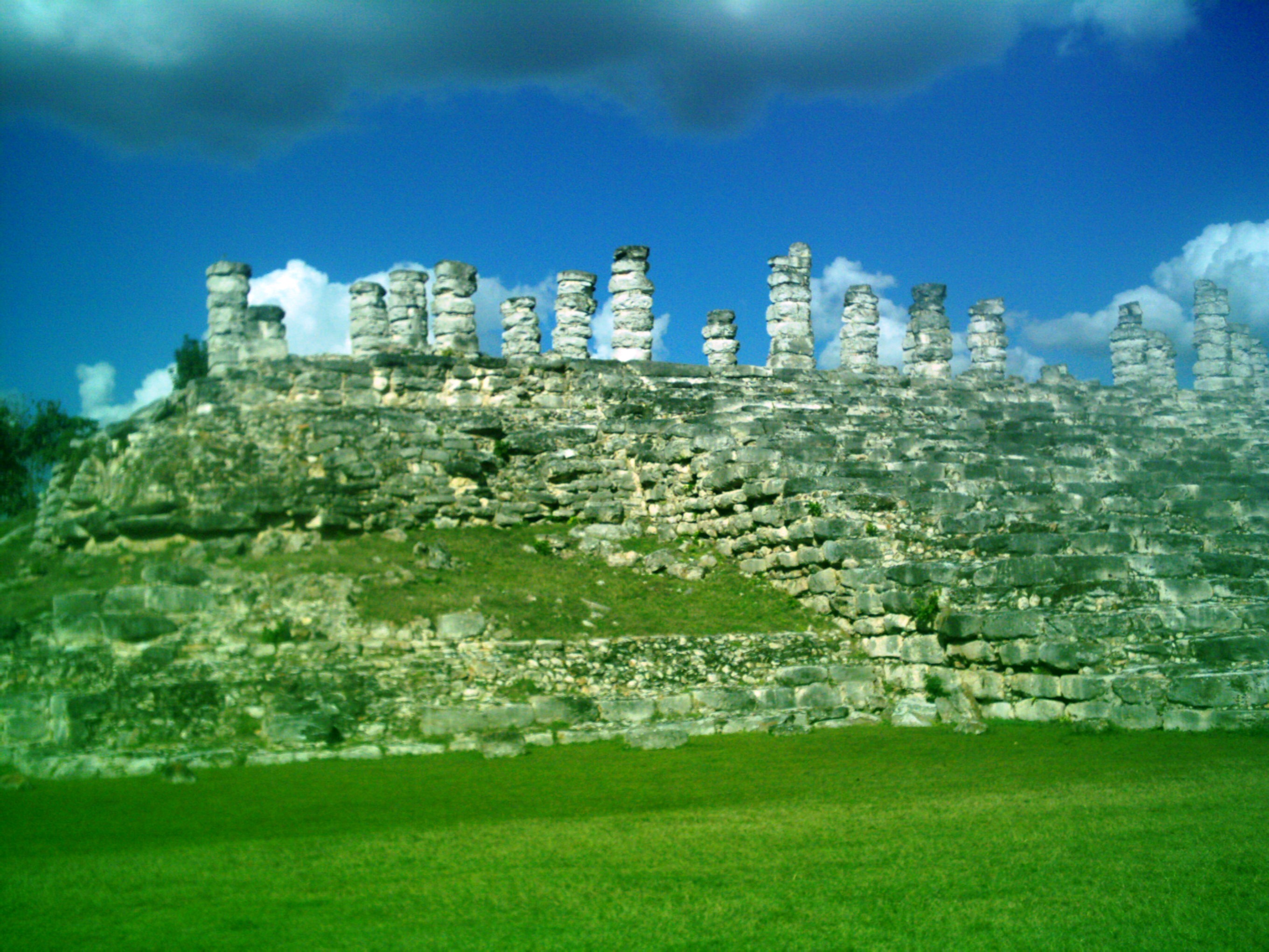 Ruinas de Aké.